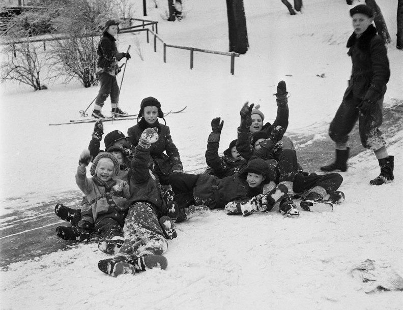 Barn leker i snön och åker skidor i Stockholms parker